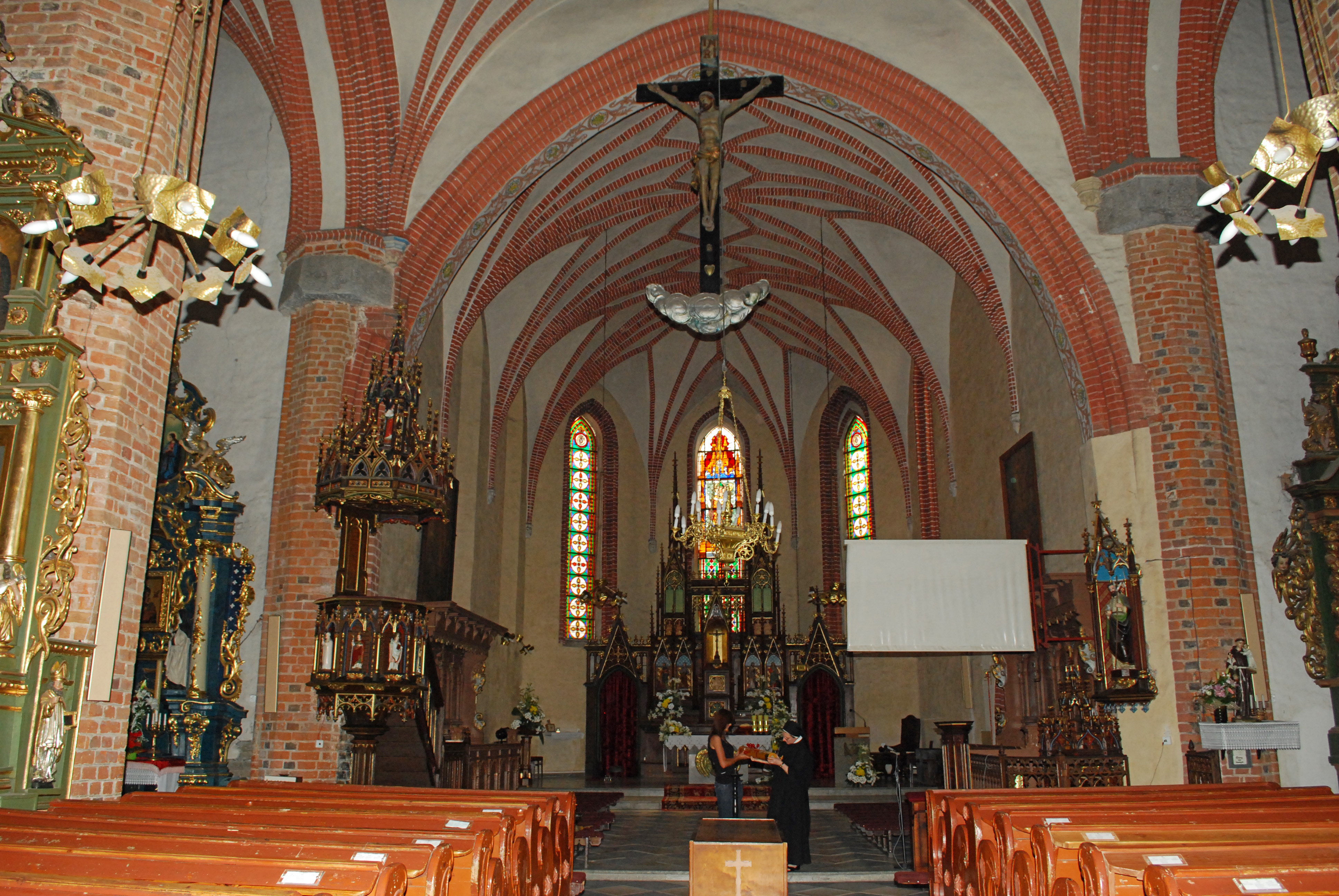 Kościół św. Mikołaja w Gniewie, wnętrzne.